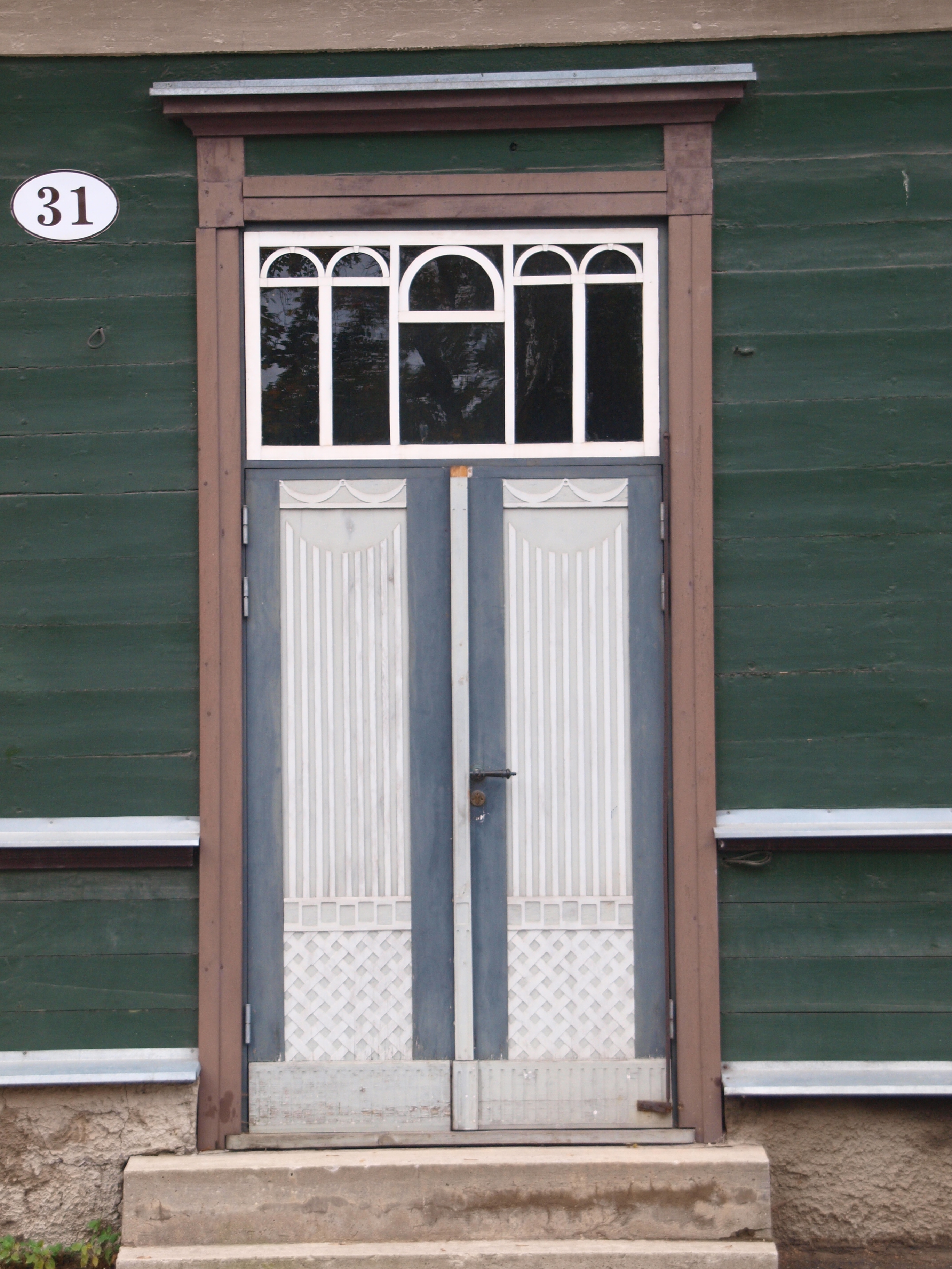 Puitelamu Tartus Kalevi 31, 19.saj. I p.